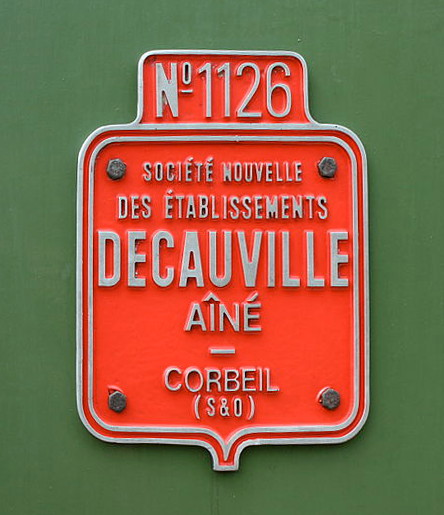 No 1126. Soci�t� Nouvelle des �tablissements Decauville A�n�. Corbiel (S&O)